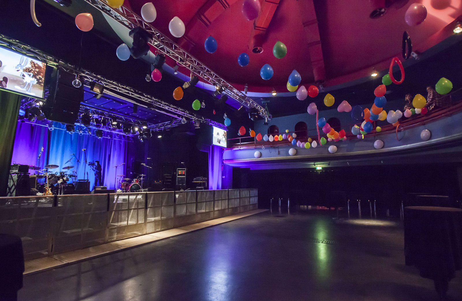 Kulttuuriareena Glorian sisätila